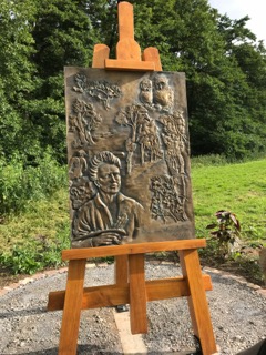 Gedenktafel, gestaltet durch den Bildhauer Raphael Strauch, Helmern